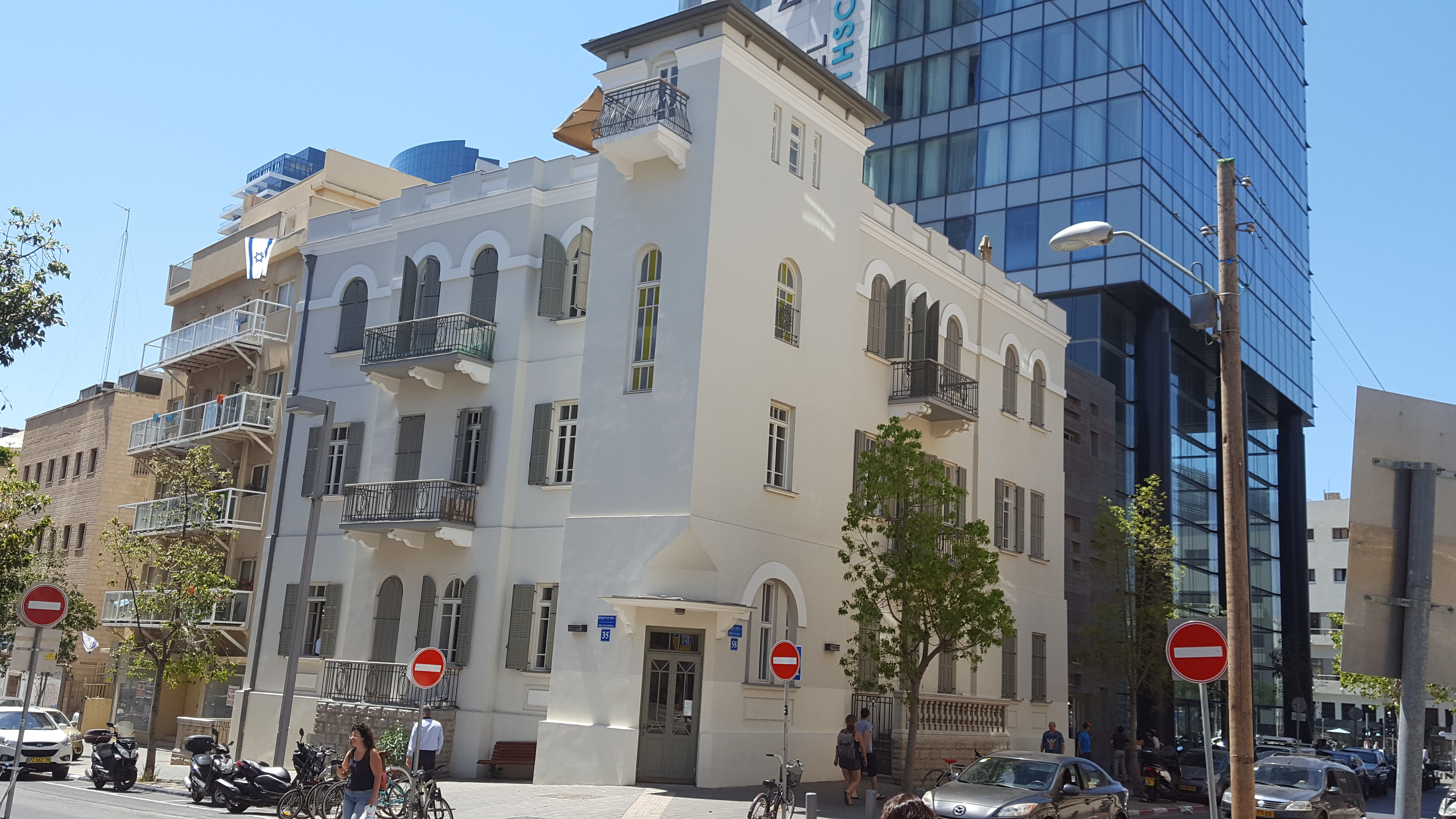 בית בכר